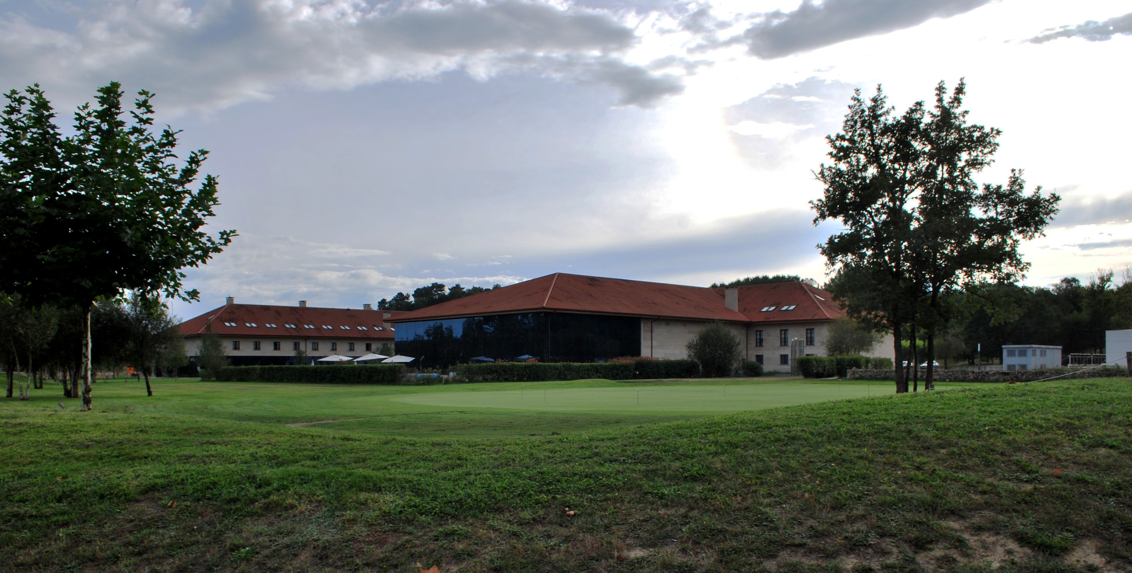 Vista do Hotel Balneario de Augas Santas en Ferreira de Pantón, Lugo Galiza Spain